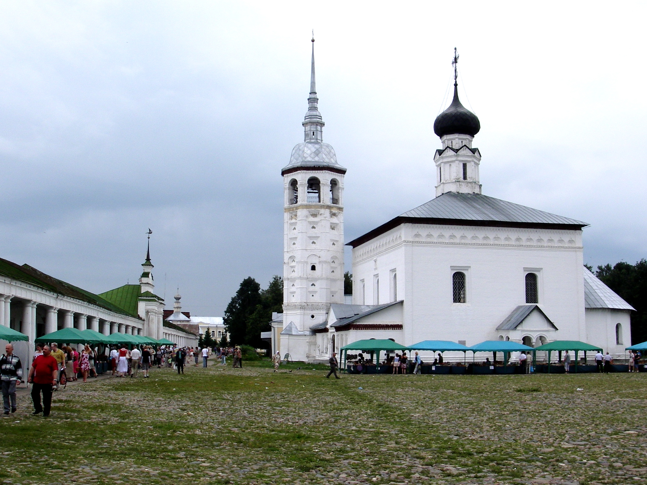 Suzdal